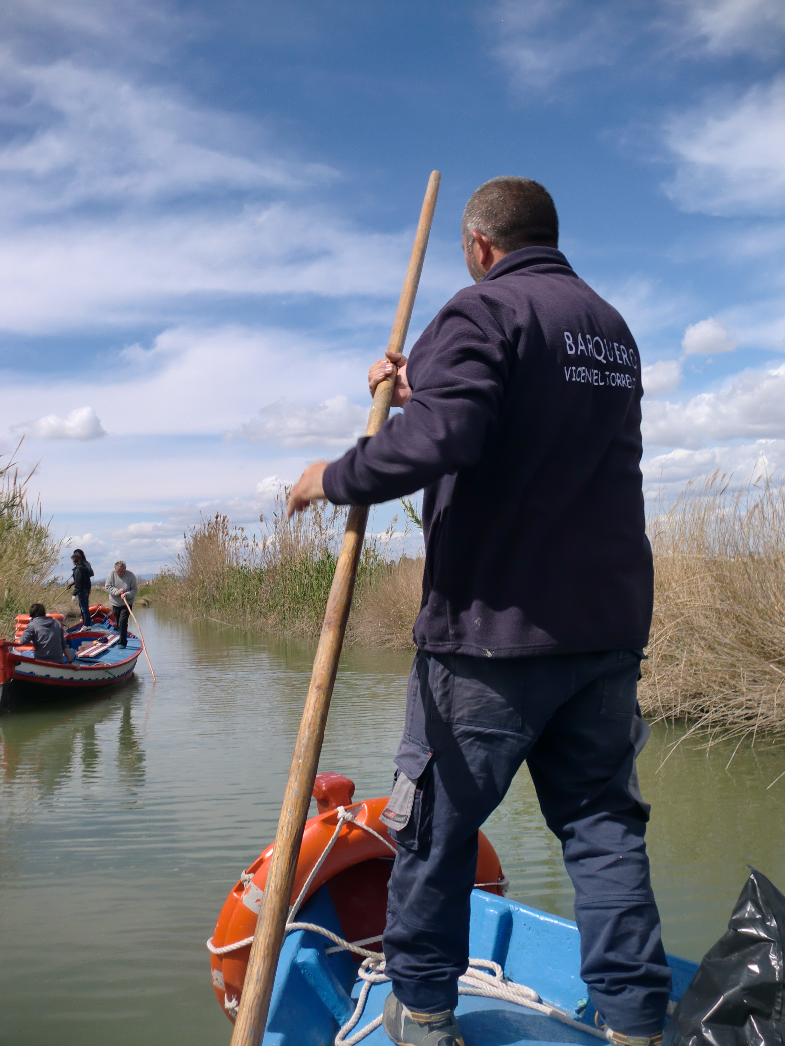 Acabem la neteja a Silla. Imatge presentada al concurs fotogràfic Horta Net@ 2013 organitzat per la Xarxa